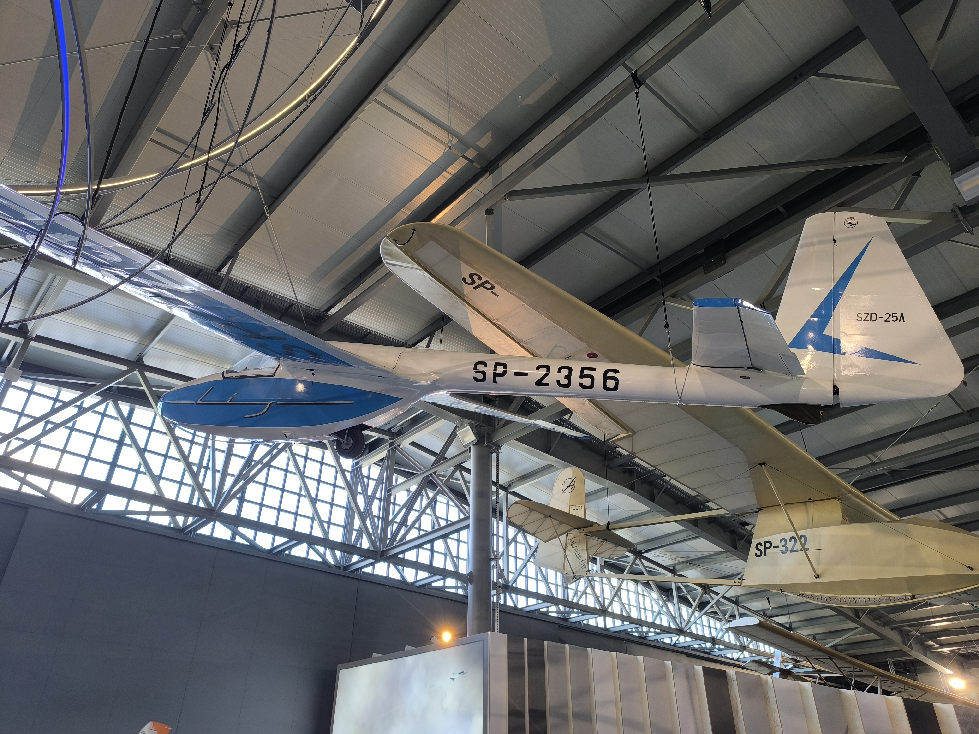 Szybowiec SZD-25 Lis na lotnisku Aeroklubu Gliwickiego